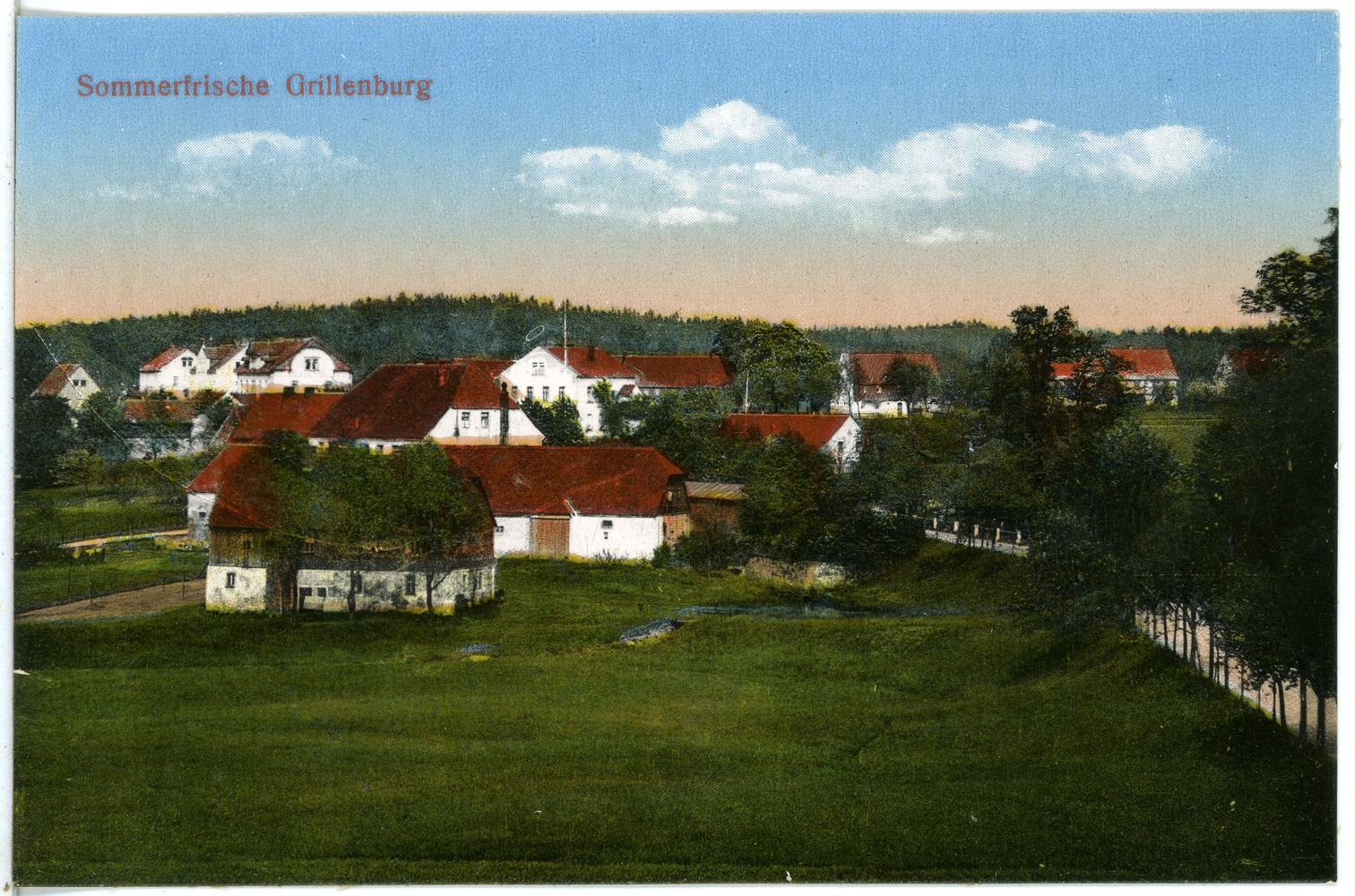 Grillenburg; Gesamtansicht This postcard is from publisher Brück & Sohn in Meißen ( postcard has a unique number 22138 and is available in a higher resolution at the publisher. This images was uploaded in a cooperation project between Wikipedians and the publisher.